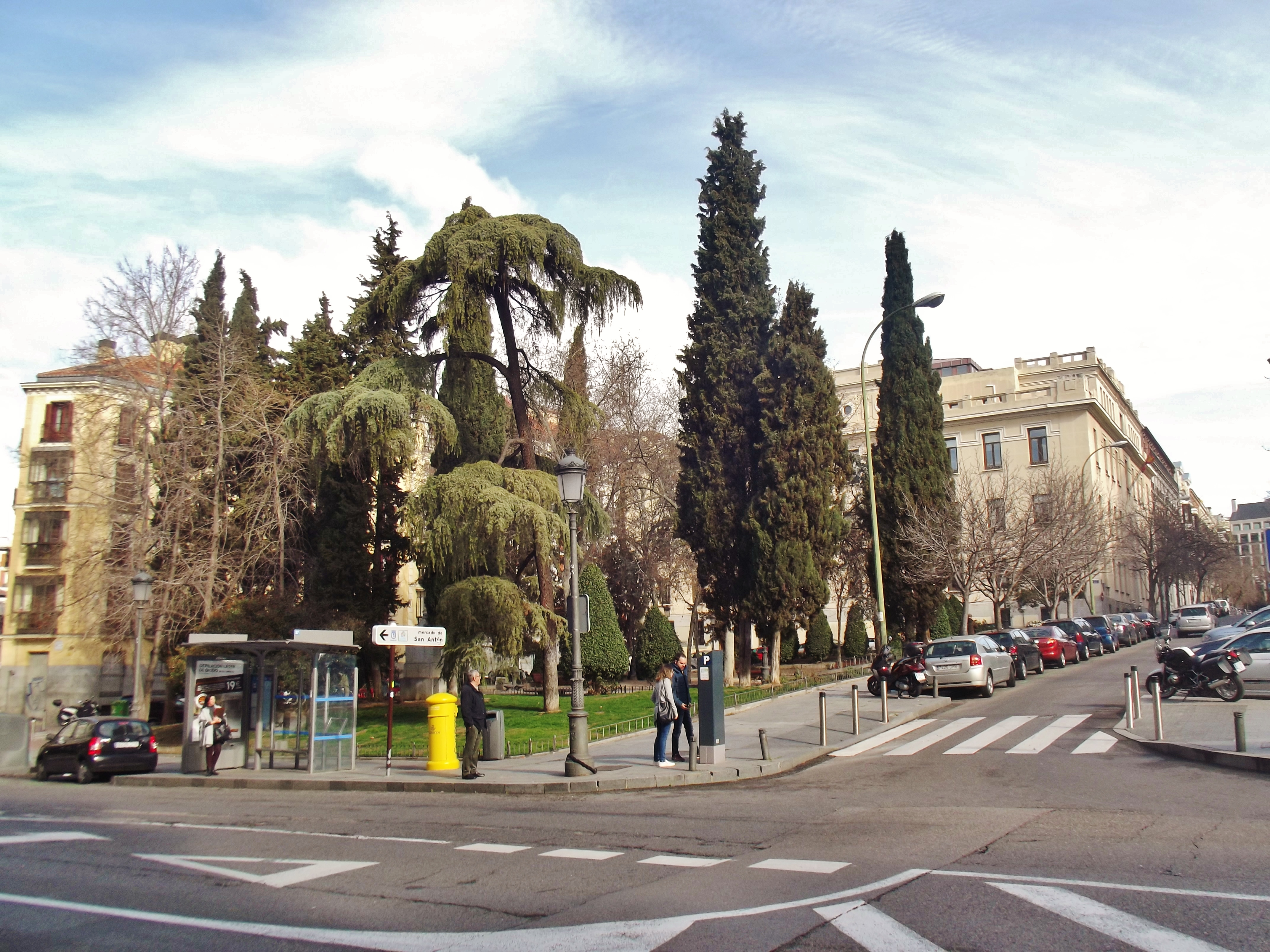 Plaza de las Salesas, Madrid.